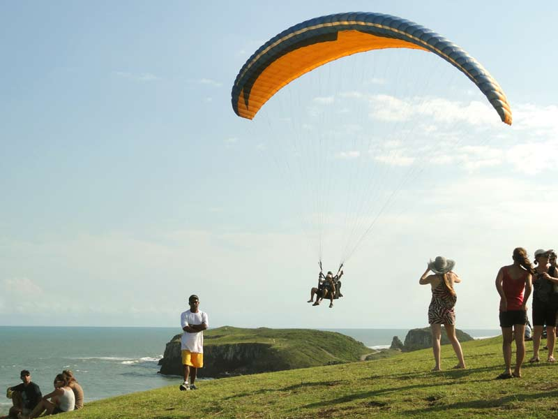 paraglider em torres